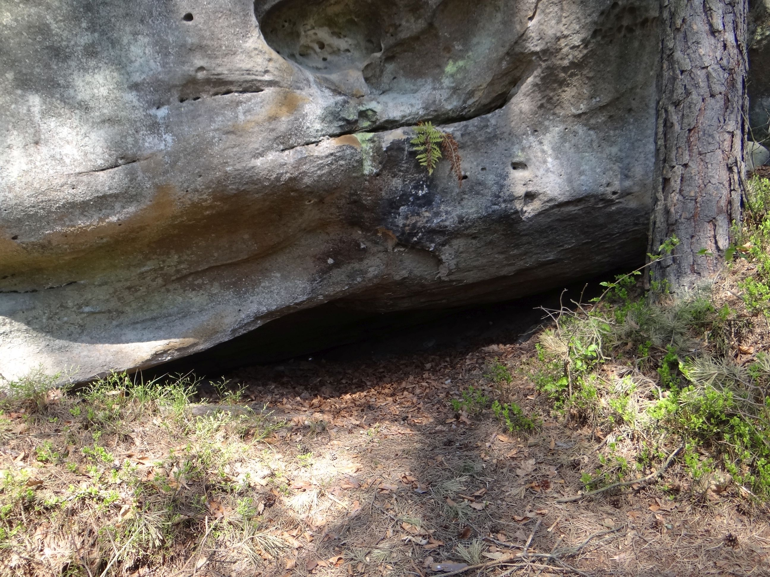 Koleba za Borsukiem w rezerwacie przyrody Skamieniałe Miasto w Ciężkowicacaves